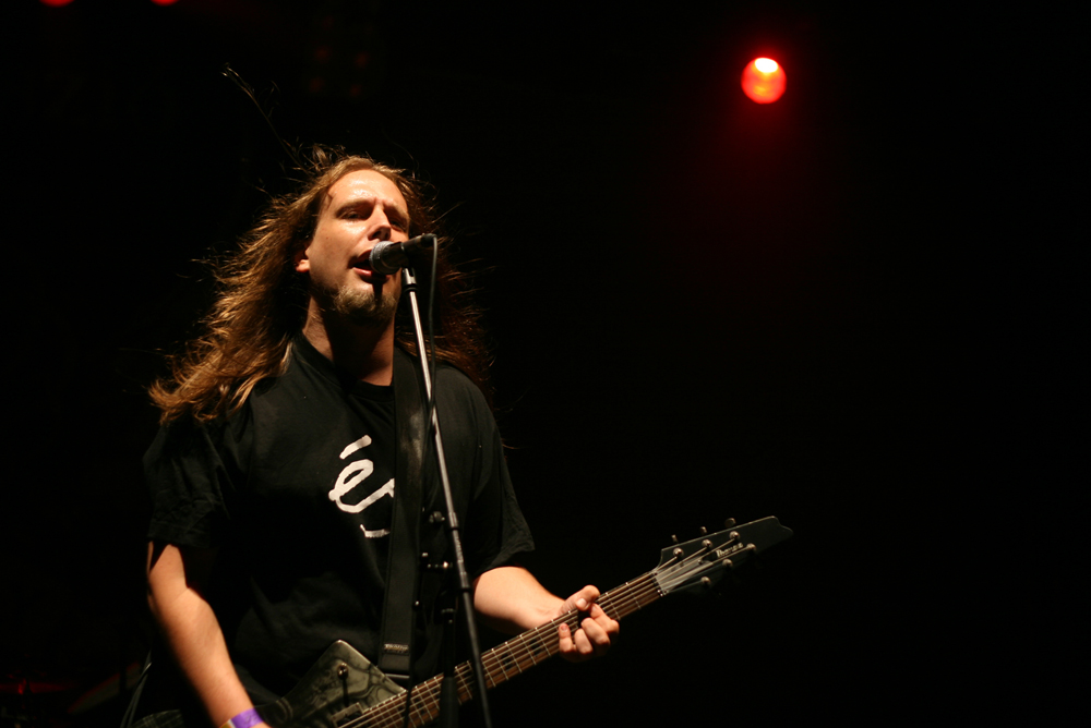 Depresszió live at a concert.